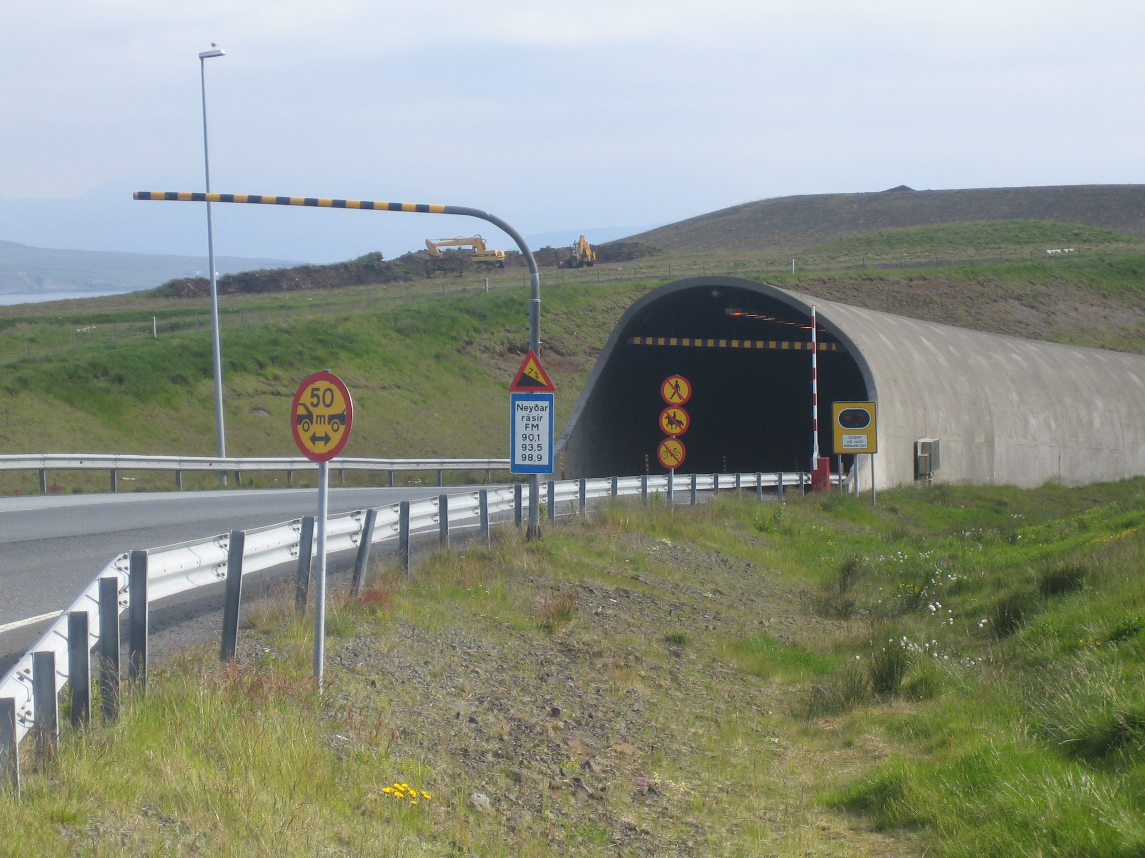 Inngangur að Hvalfjarðagöngum sunnanmegin